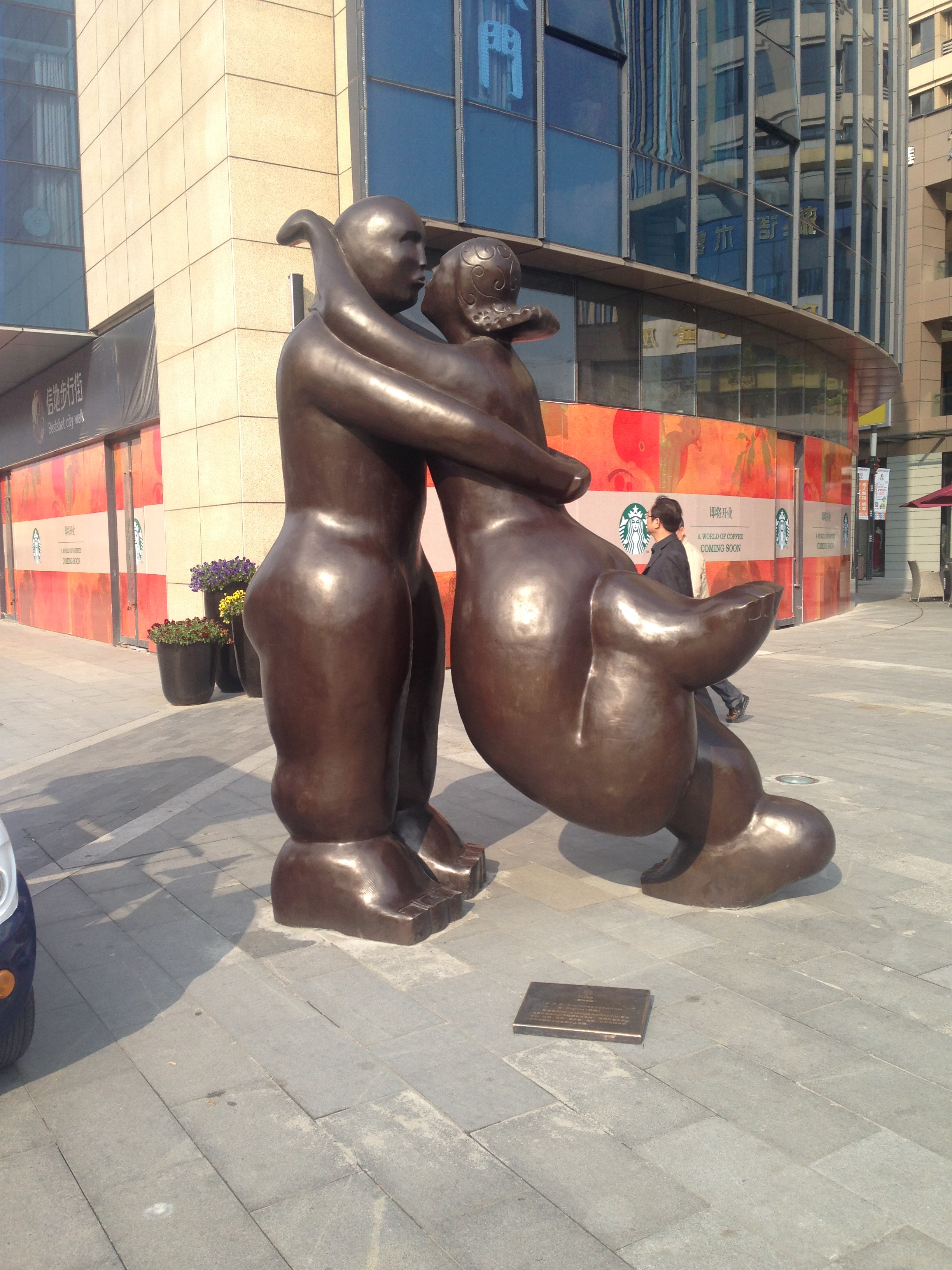 statue bronze